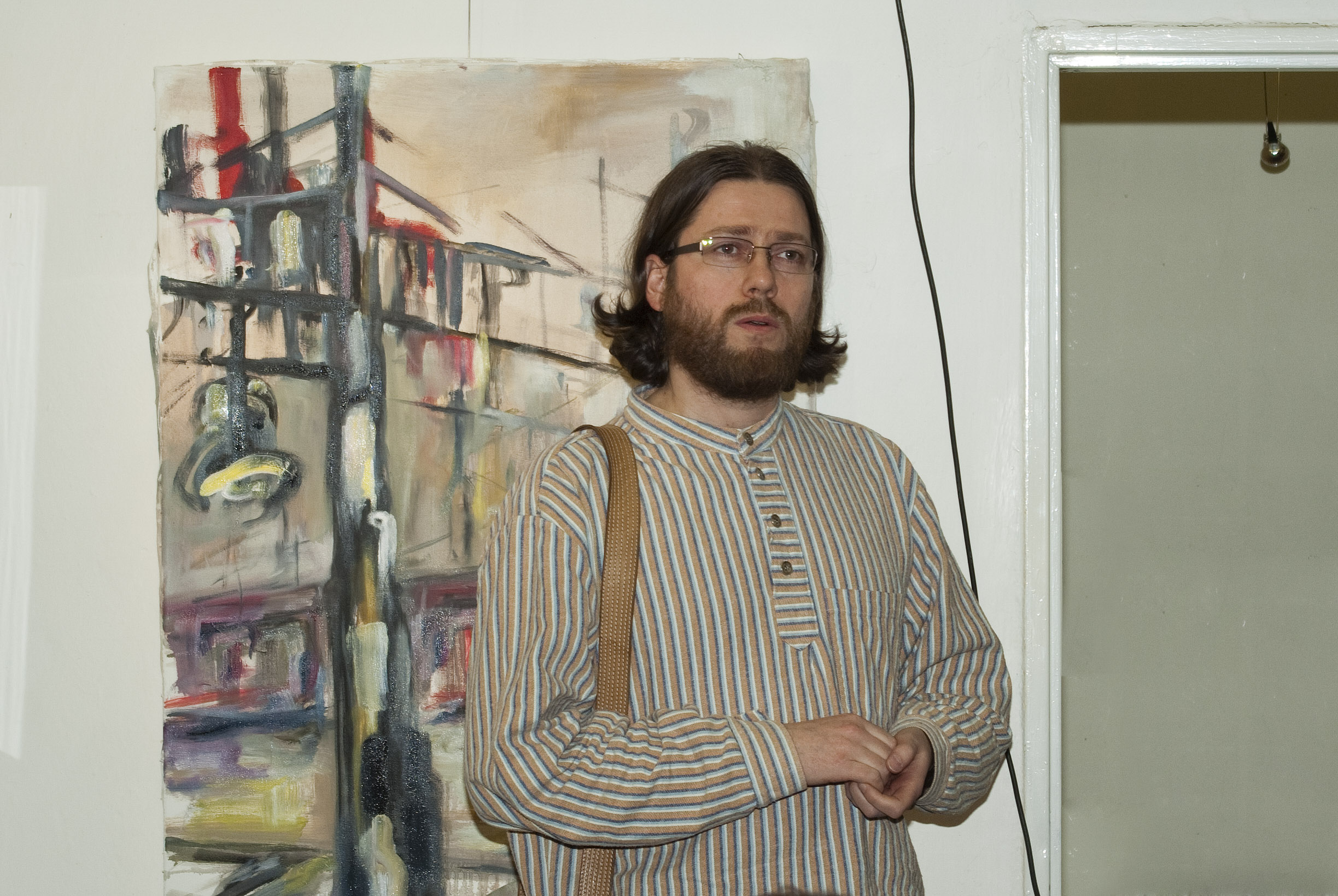 Básník Vojtěch Kučera v roce 2011 na Vsetíně na večírku u příležitosti patnácti let časopisu Texty.